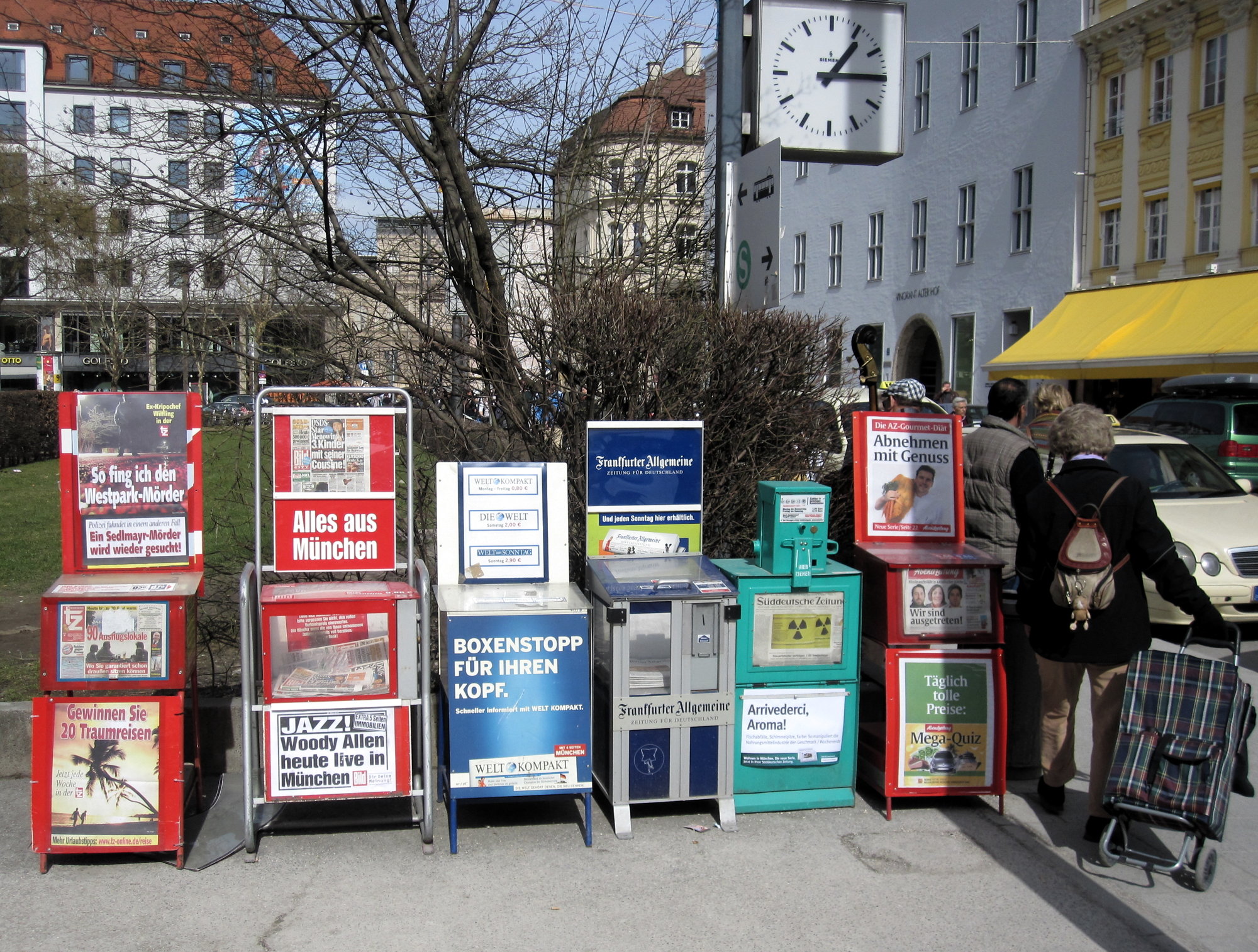 Zeitungsautomaten an der Ecke Dienerstraße/Landschaftsstraße auf dem Marienhof (hinter dem Neuen Rathaus) in der Münchener Altstadt; am rechten Bildrand ein Teil der Fassade des Dallmayr-Stammhauses.